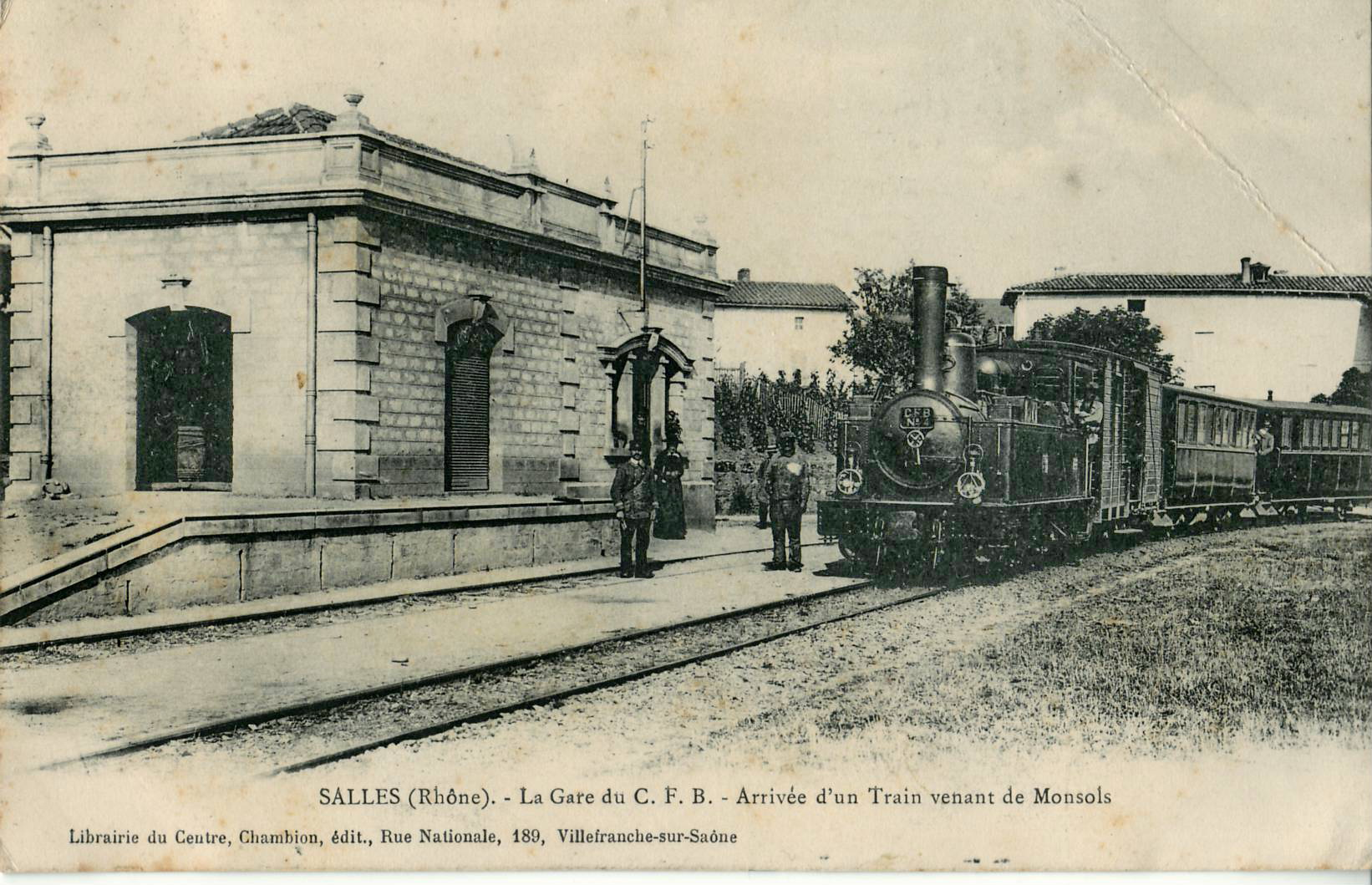 Carte postale éditée par la Librairie du Centre (Chambion) 189 rue Nationale à Villefranche-sur-Saône : SALLES - La gare du CFB - Arrivée d'un train venant de Monsols